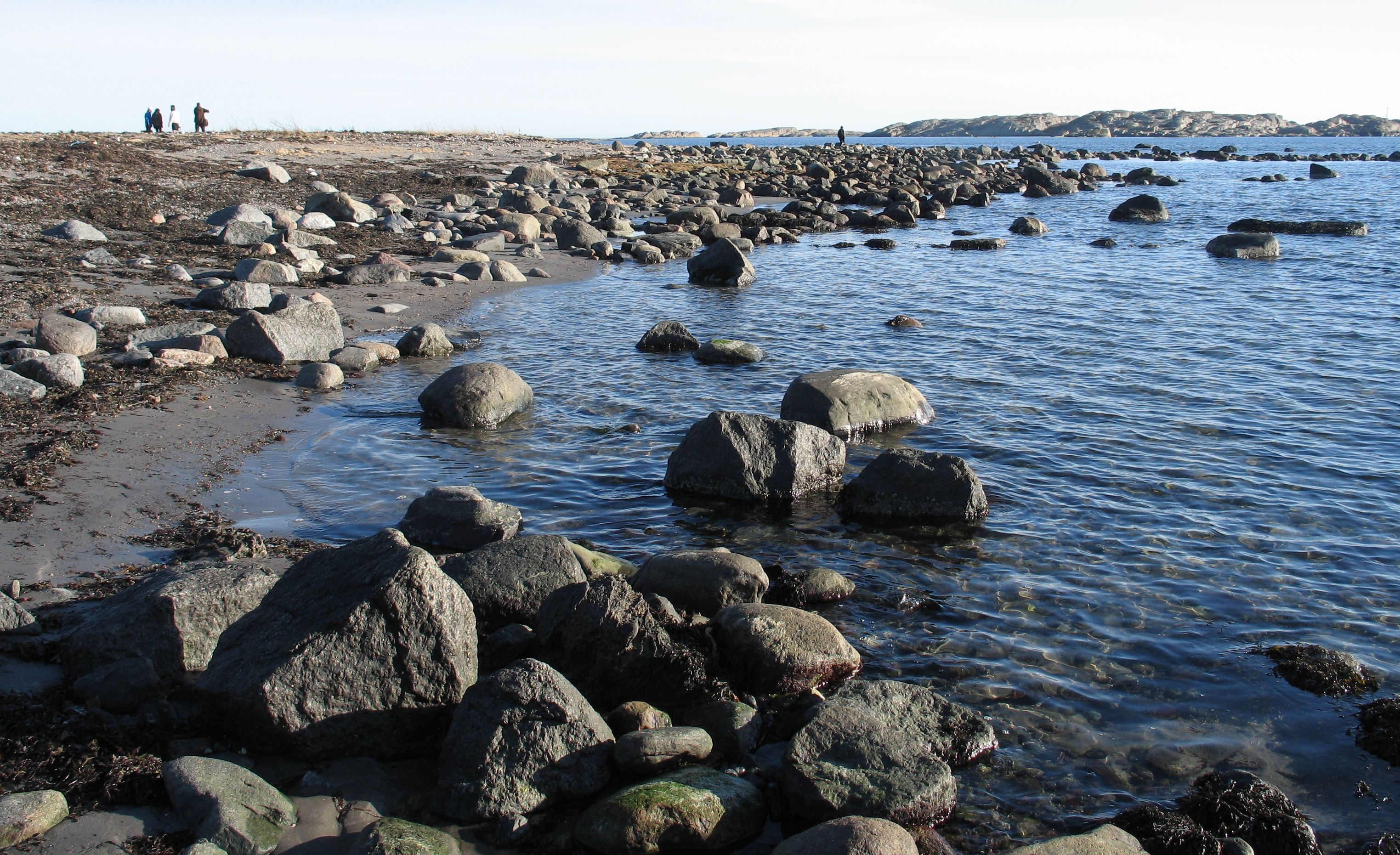 Pirane naturreservat